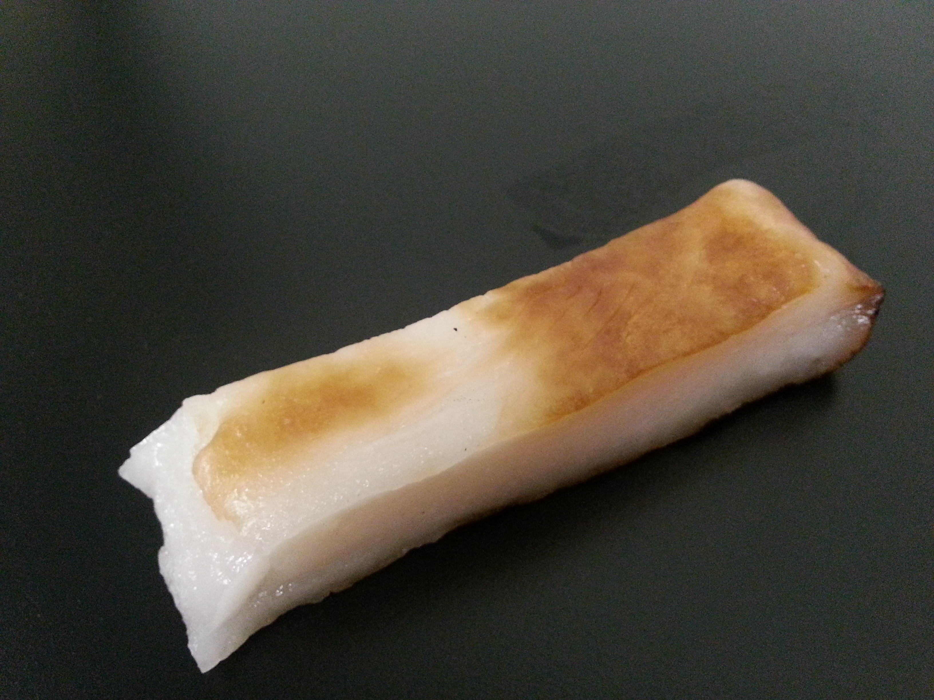 Rēti’a acheté à Papeete. Ingrédients : lait de coco, amidon, sucre.